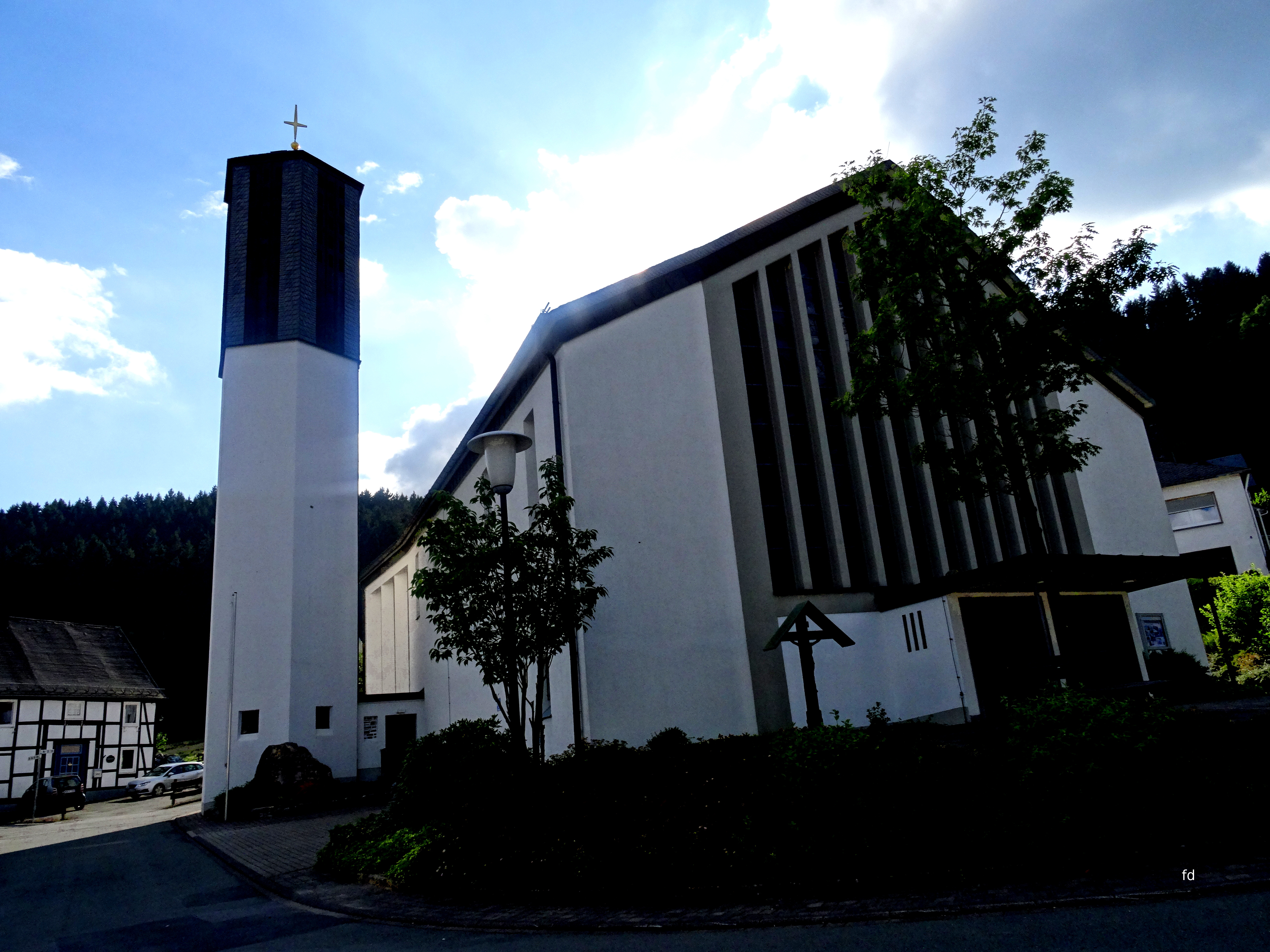 St.Nikolaus-Kirche in Bestwig Heringhausen